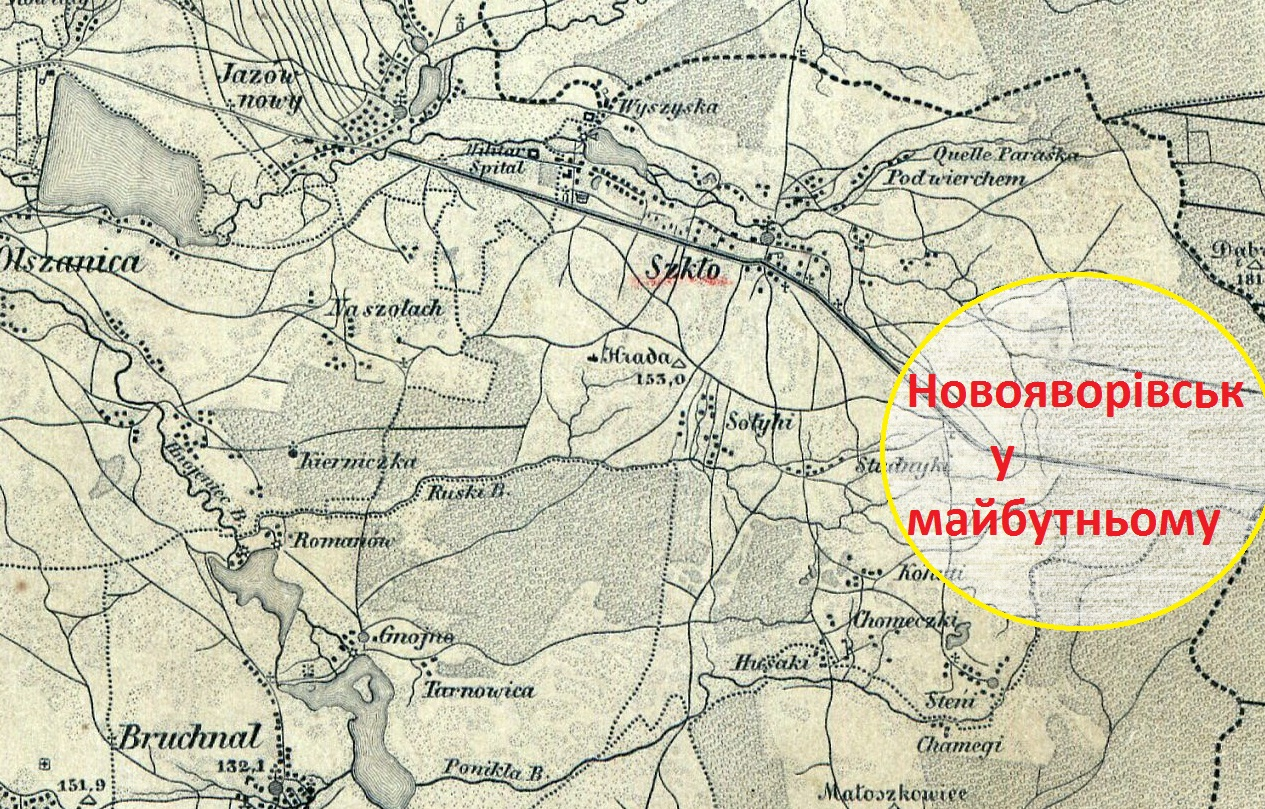 Місцевість де постане місто (Новий Яворів)